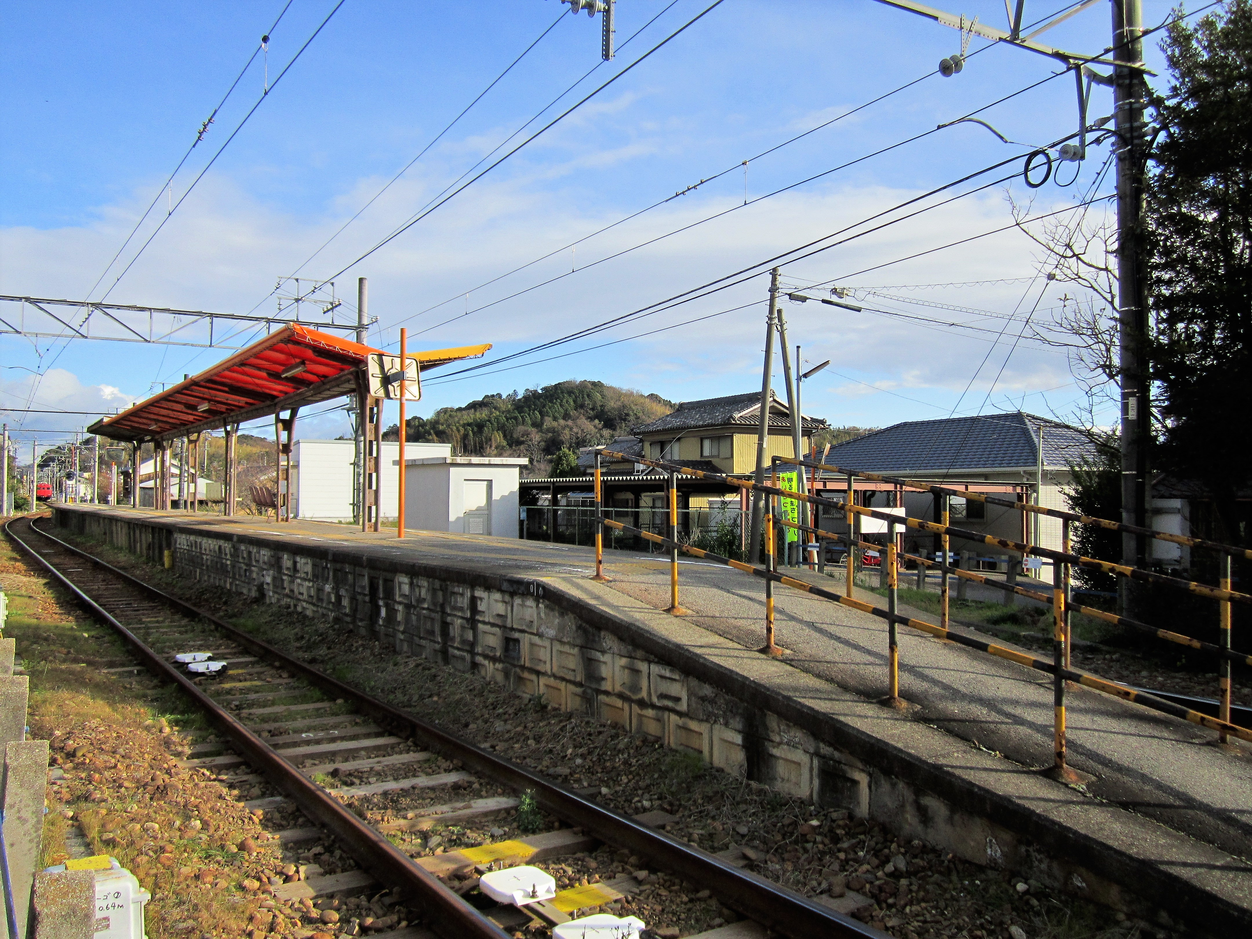 西幡豆駅ホーム Canon PowerShot A2200